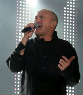 Bildbeschreibung: Phil Collins bei einem Konzert in Düsseldorf am 2005-11-12 Quelle: Fotograf/Zeichner: Ulrich Klemt Datum: 2005-11-12 Sonstiges: Genehmigung liegt mir vor; mit freundlicher Genehmigung von Deutscher Genesis Fanclub "it"